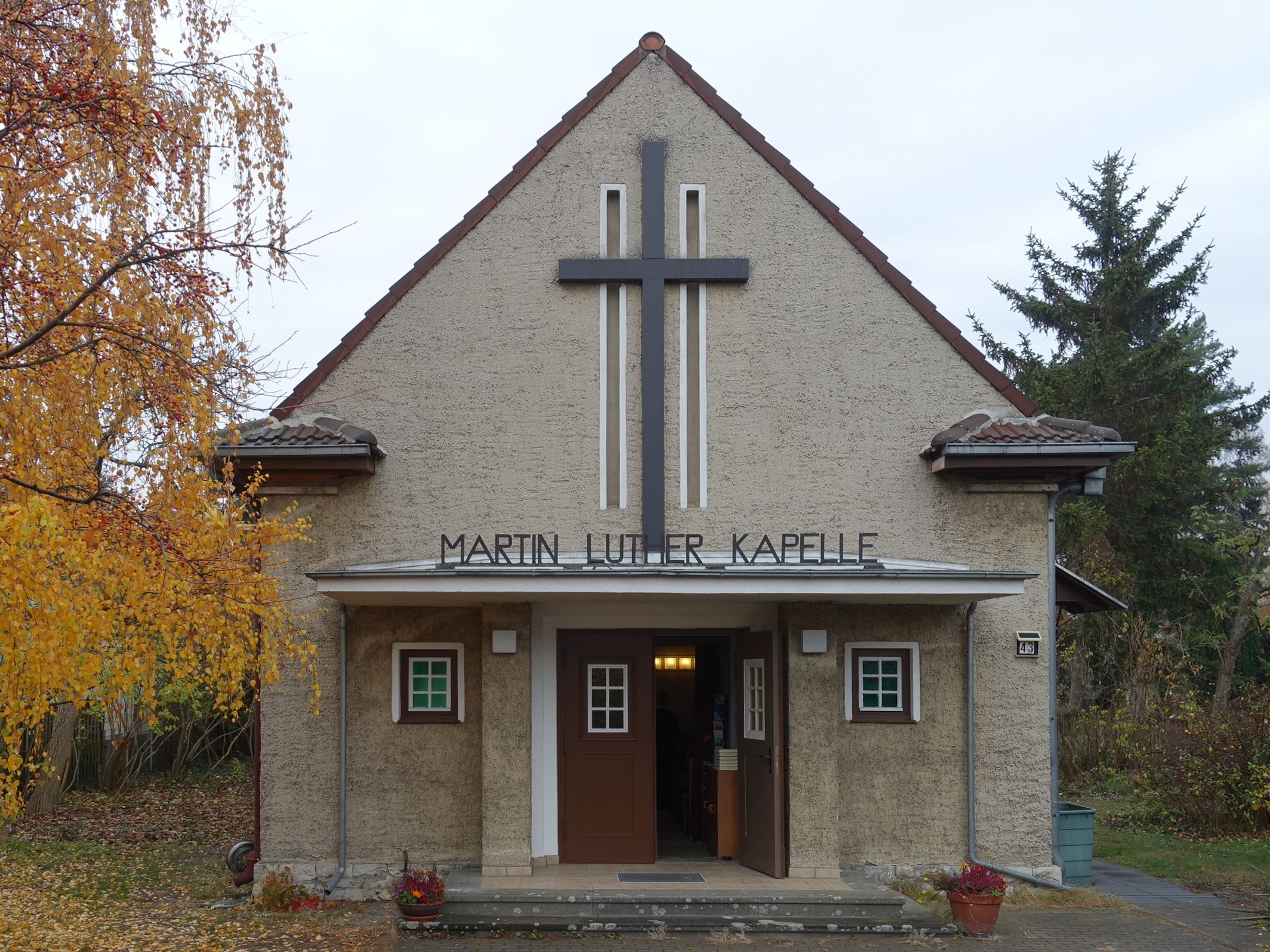 Der Eingang der Martin-Luther-Kapelle